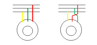 mootori pöörlemissuuna muutmine